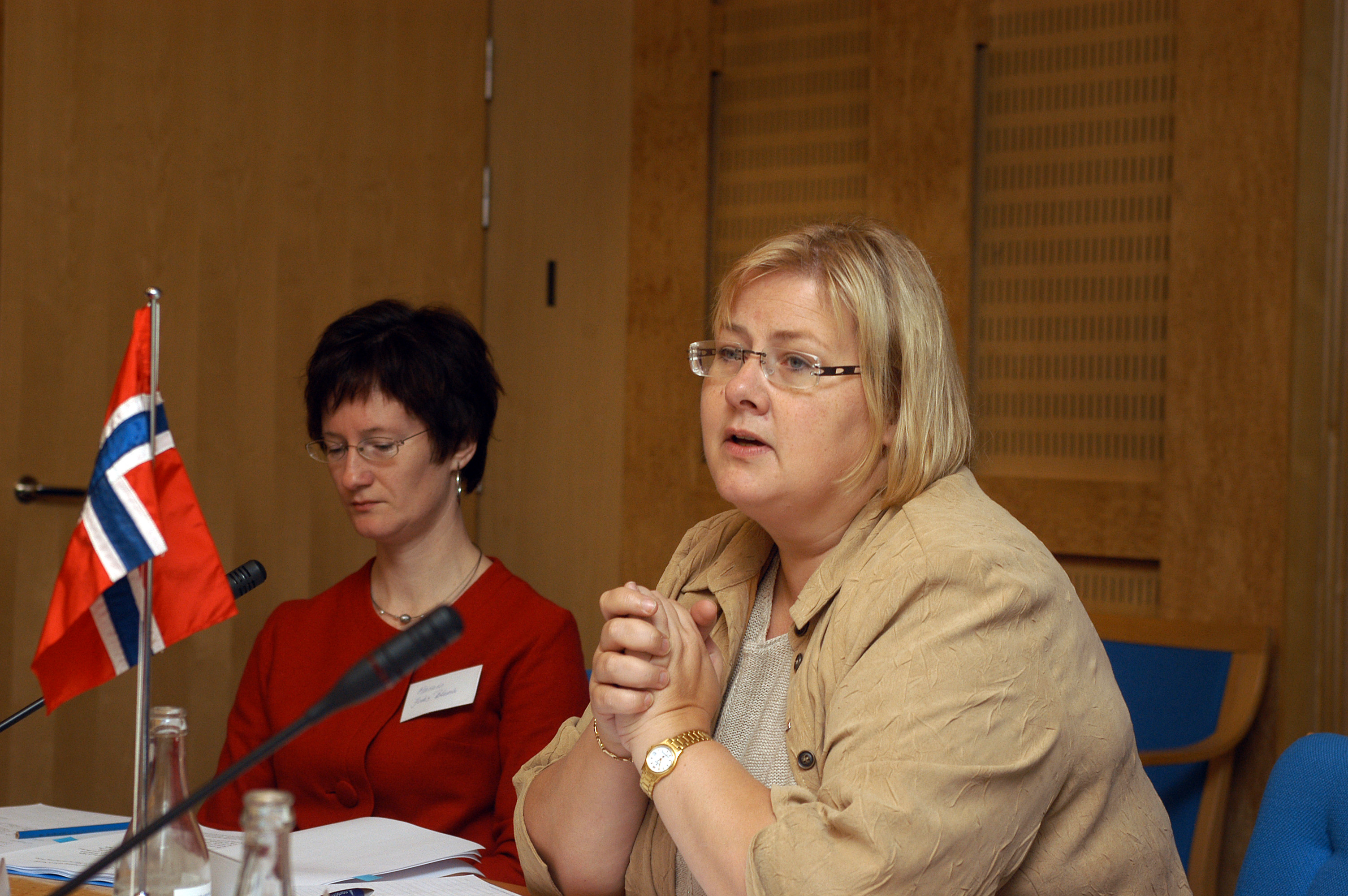 Erna Solberg, bostadsminister Norge, under nordiskt-baltiskt bostadsministermöte, Nordiska rådets session i Stockholm.